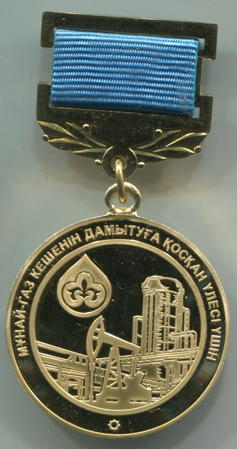 Нагрудный знак "За вклад в развитие нефтегазовой отрасли" (Казахстан)